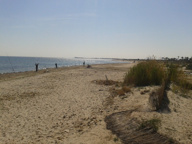 Las Higuericas(Pilar de la Horadada) Alicante